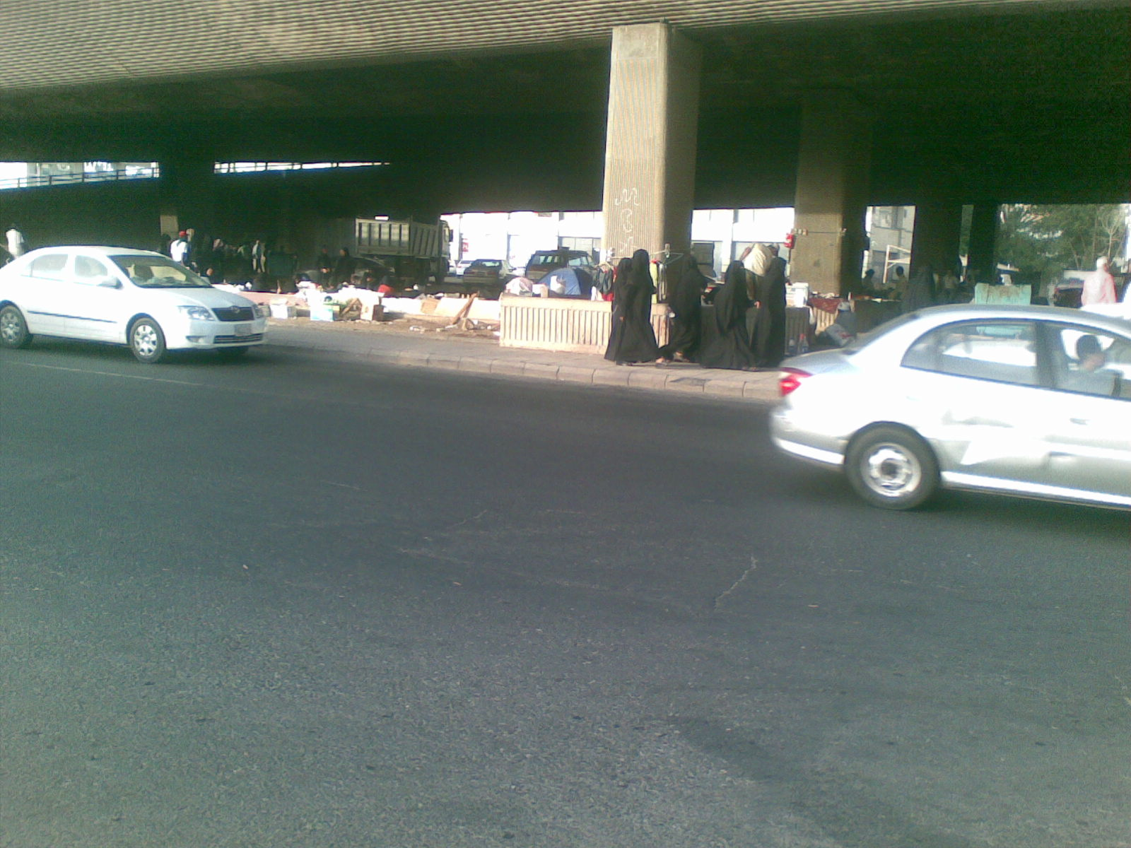 ജിദ്ദയിലെ കന്ത്ര പാലത്തിനു ചുവട്ടിൽ രേഖകളില്ലാതെ നാട്ടിലേക്ക് പോകാൻ കാത്തിരിക്കുന്ന ഏഷ്യൻ വംശജർ